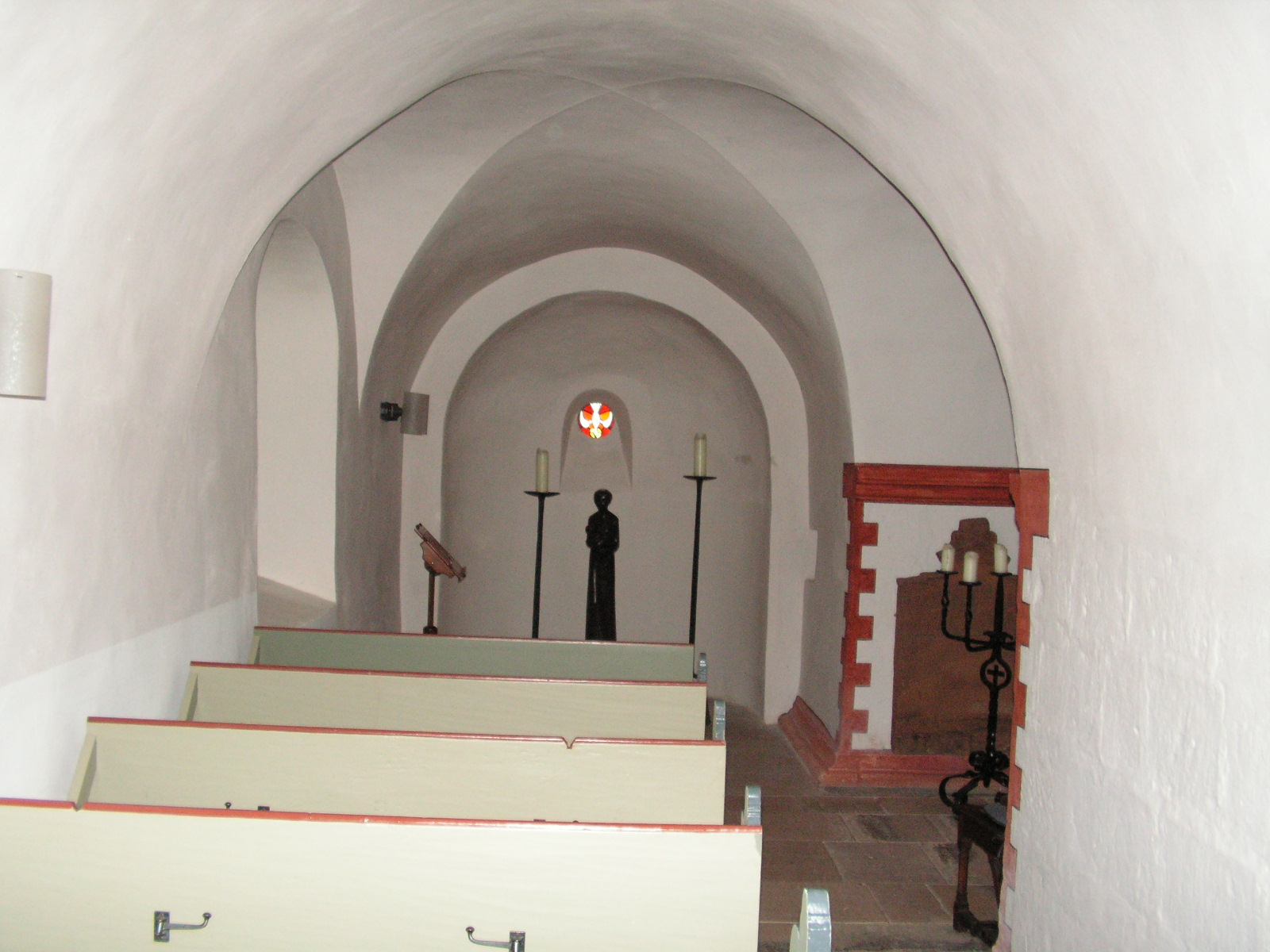 Nikolaikirche Caldern (ehem. Zisterzenserinnenkirche). Nördl. Seitenschiff (Johanniskapelle) nach Östen.